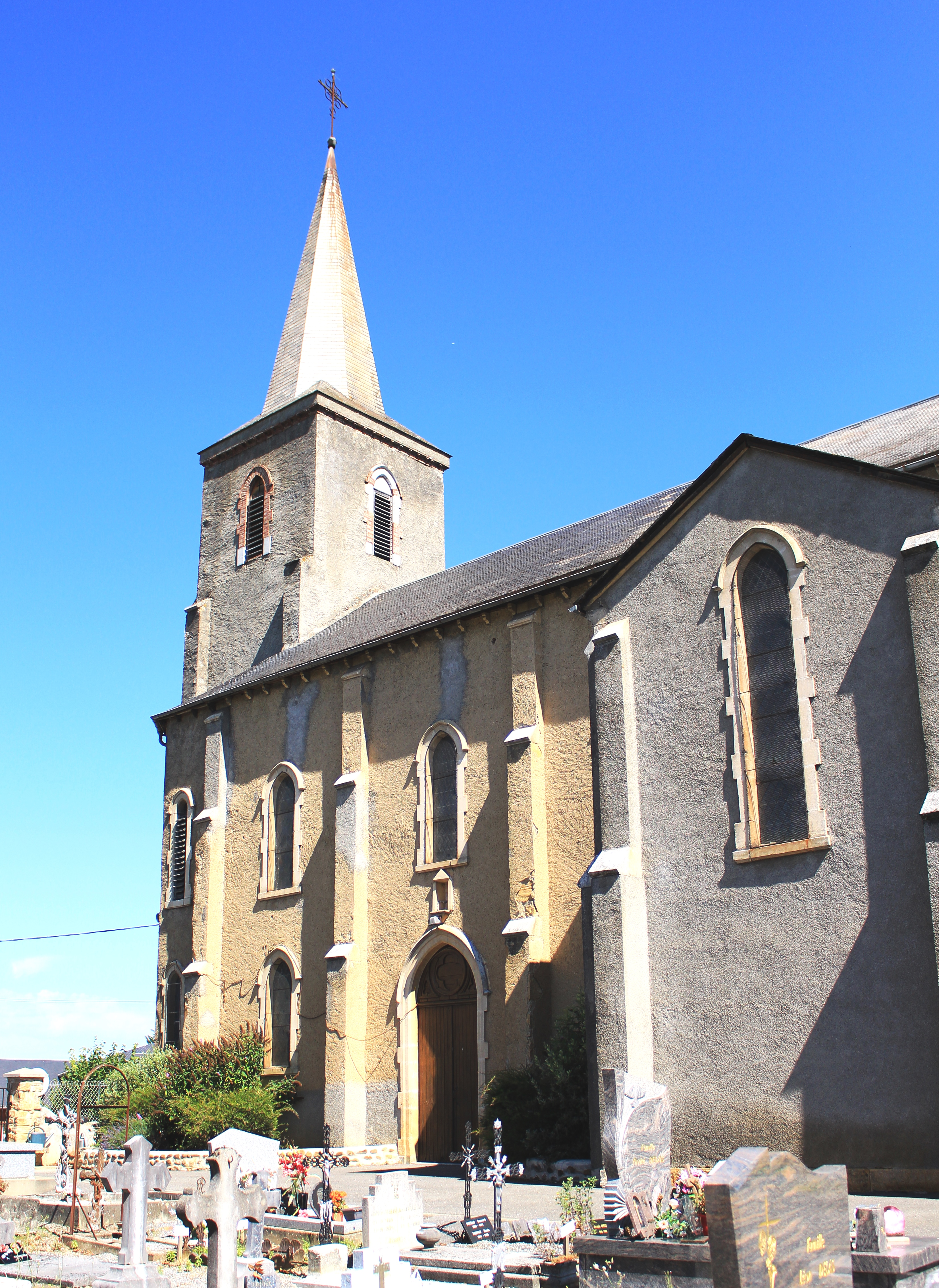 Église Saint-Martin de Bégole (Hautes-Pyrénées)